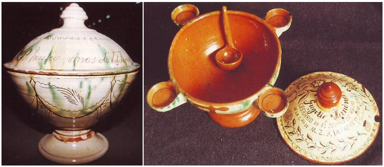 Poncheras (fuentes para preparar y servir ponches: sangría, cuerva, limonada, zurra, etc). Izq: ponchera del Museo de Vinos de Valdepeñas, obra del alfarero Basiliso Tellez Bonillo (hacia 1960). Drcha: tres piezas (fuente, tapa y cucharón) de una ponchera de cuatro puestos encargada por Gregorio Hernández al alfarero M. Hernández (como se lee en la tapa), decorada con ramos, escenas y detalles como su precio (5 pesetas). Hecha en Santa Cruz de Mudela (Ciudad Real, España), en 1912.